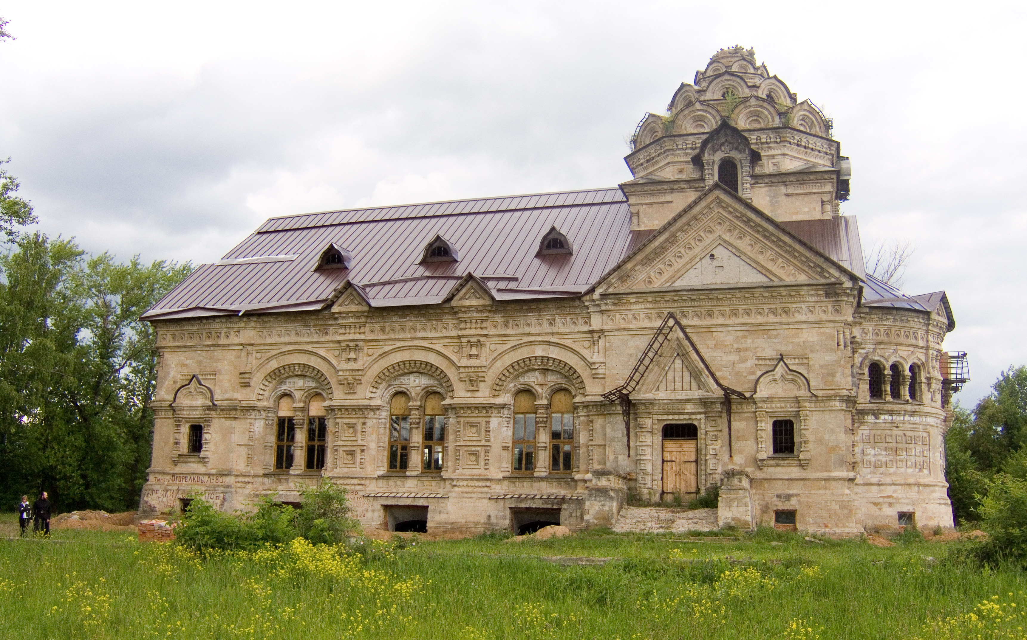 Храм Дмитрия Солунского в селе Берёзовка Данковского района Липецкой области. Храм построен в 1891 году в память о русских воинах погибших в Куликовской битве на средства, пожертвованные промышленником и меценатом Юрием Степановичем Нечаевым-Мальцовым. Архитектор - А.Н. Померанцев, инженер - В.Г.Шухов. В советское время храм был частично разрушен. Новая кровля сделана в 2008 году на пожертвования предпринимателя Виталия Черногиля.